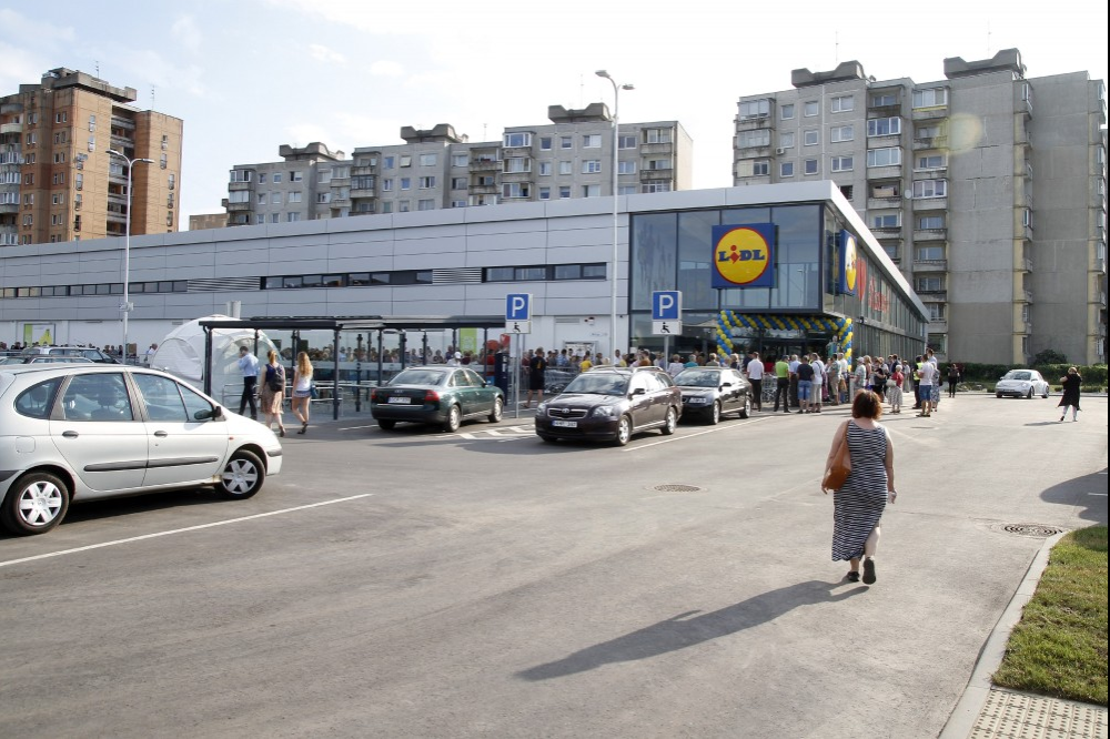 LIdl's opening in Kaunas